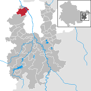 Bad Köstritz in Thuringia - District Greiz